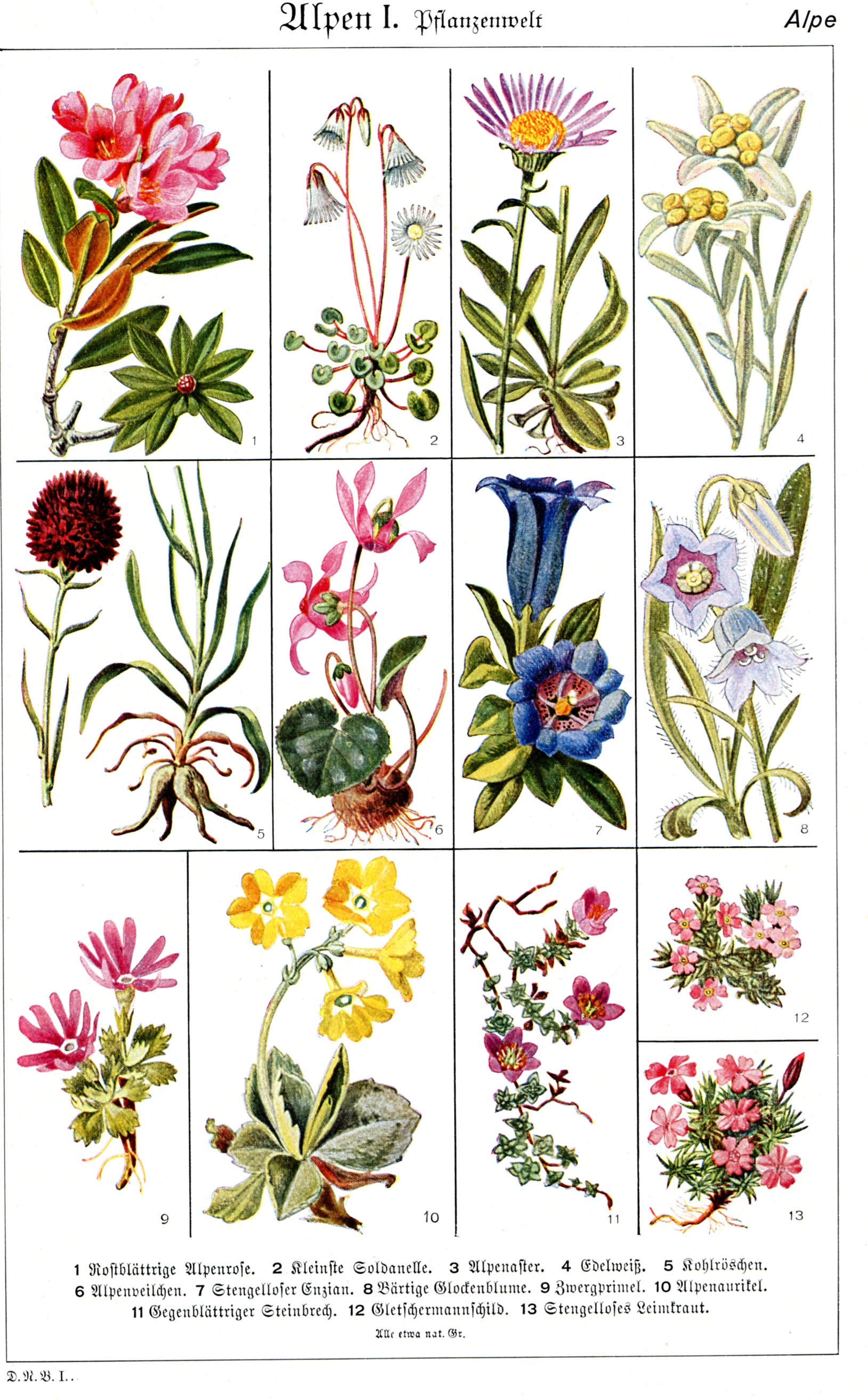 Alpine flora Rostblättrige Alpenrose Kleinste Soldanelle Alpenaster Edelweiss Kohlröschen Alpenveichen Stengelloser Enzian Bärtige Glockenblume Zwergprimel Alpenaurikel Gegenblättrige Steinbrech Gletschermannschild Stengelloses Leimkraut